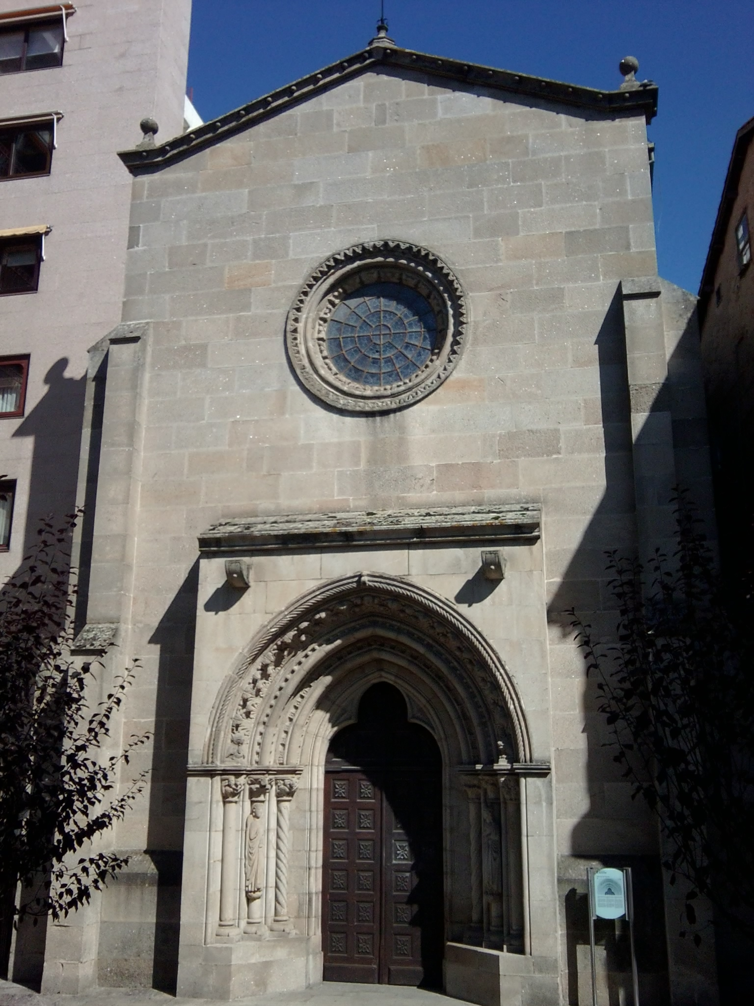 Iglesia de San Francisco - Parque de San Lázaro - Ourense - Galicia - Spain